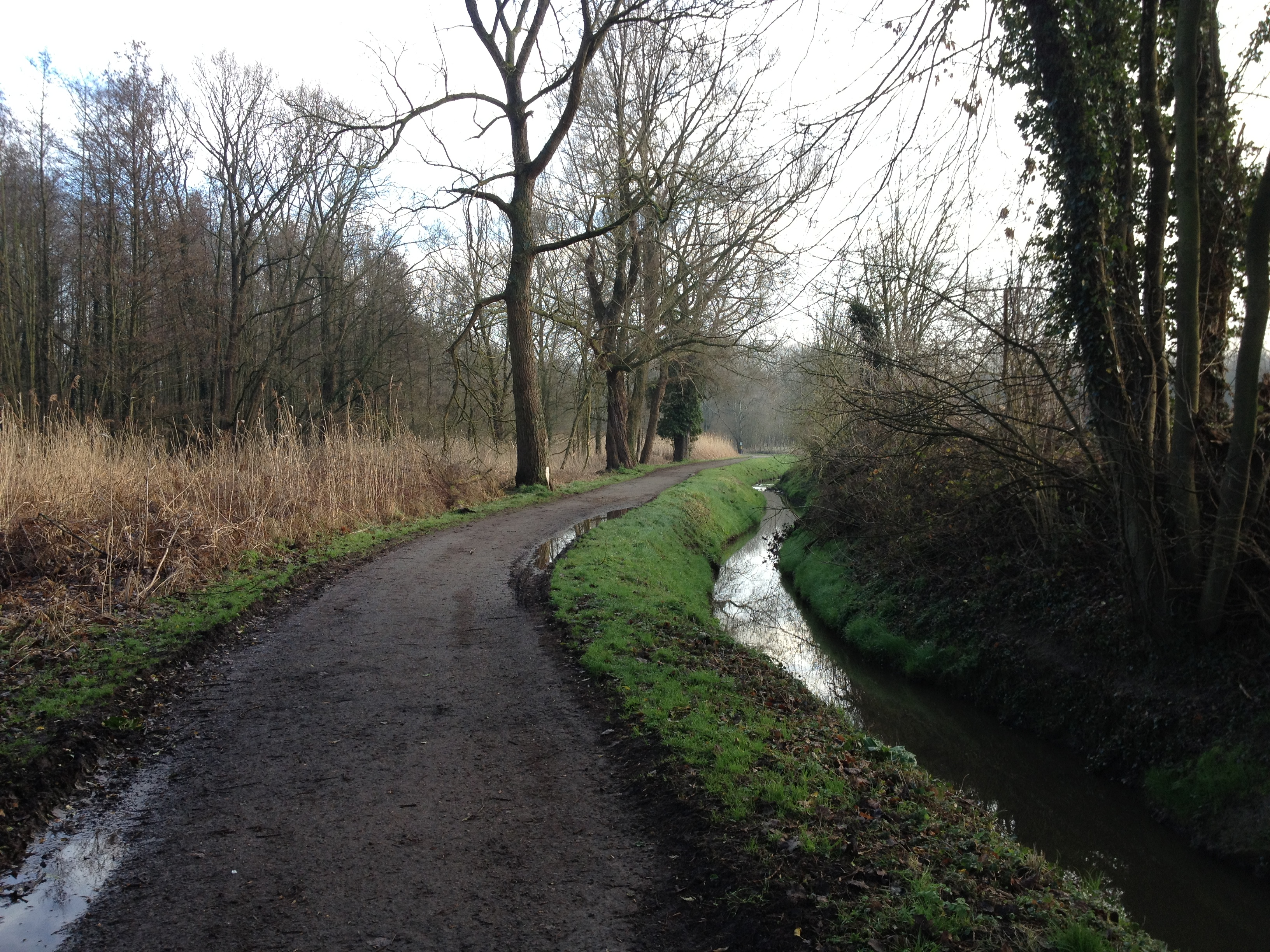 De Maalbeek in het Beverbos